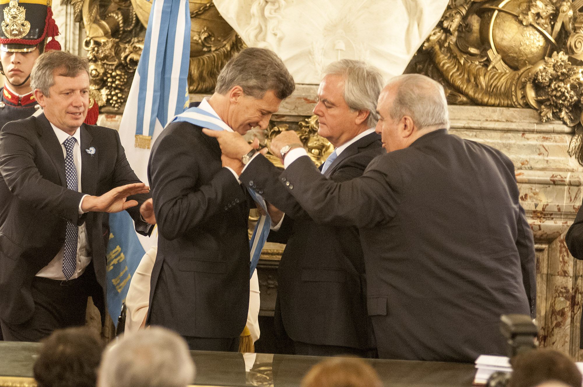 Macri recibe atributos del mando en Casa Rosada